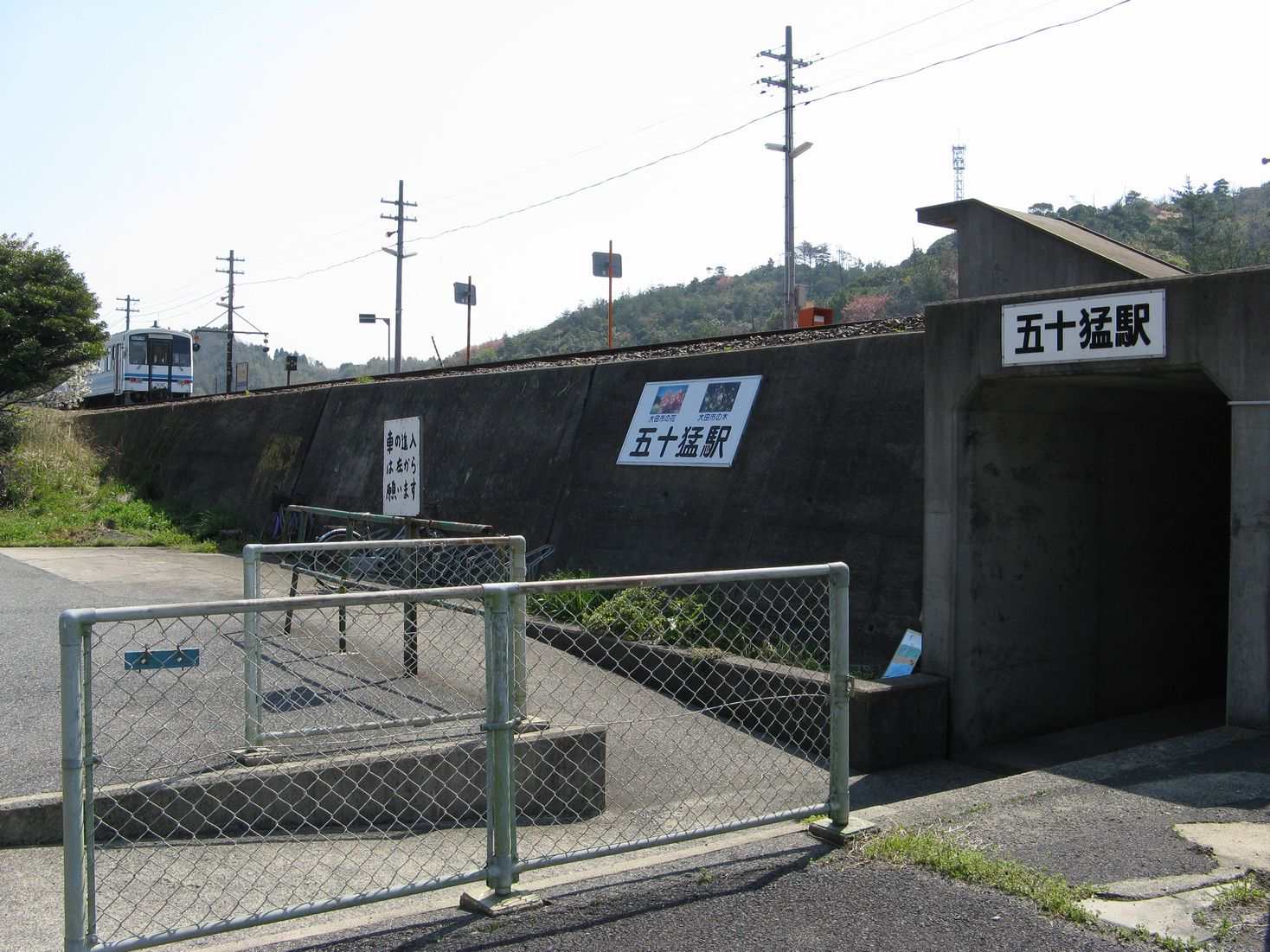 五十猛駅 右側の地下道を上がると、キハ120が停車中のホーム（左）に至る